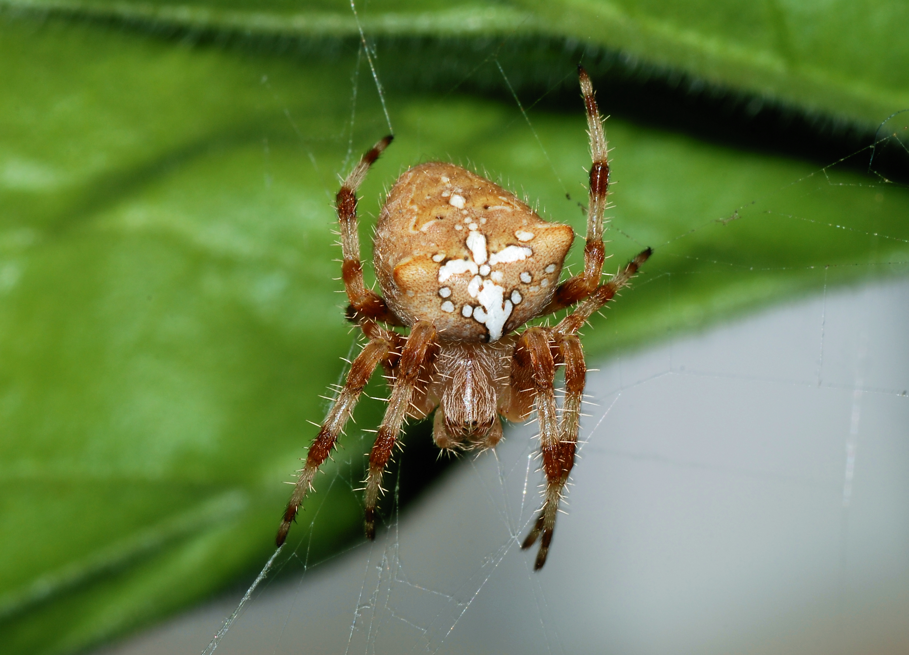 Garden spider (Araneus pallidus)